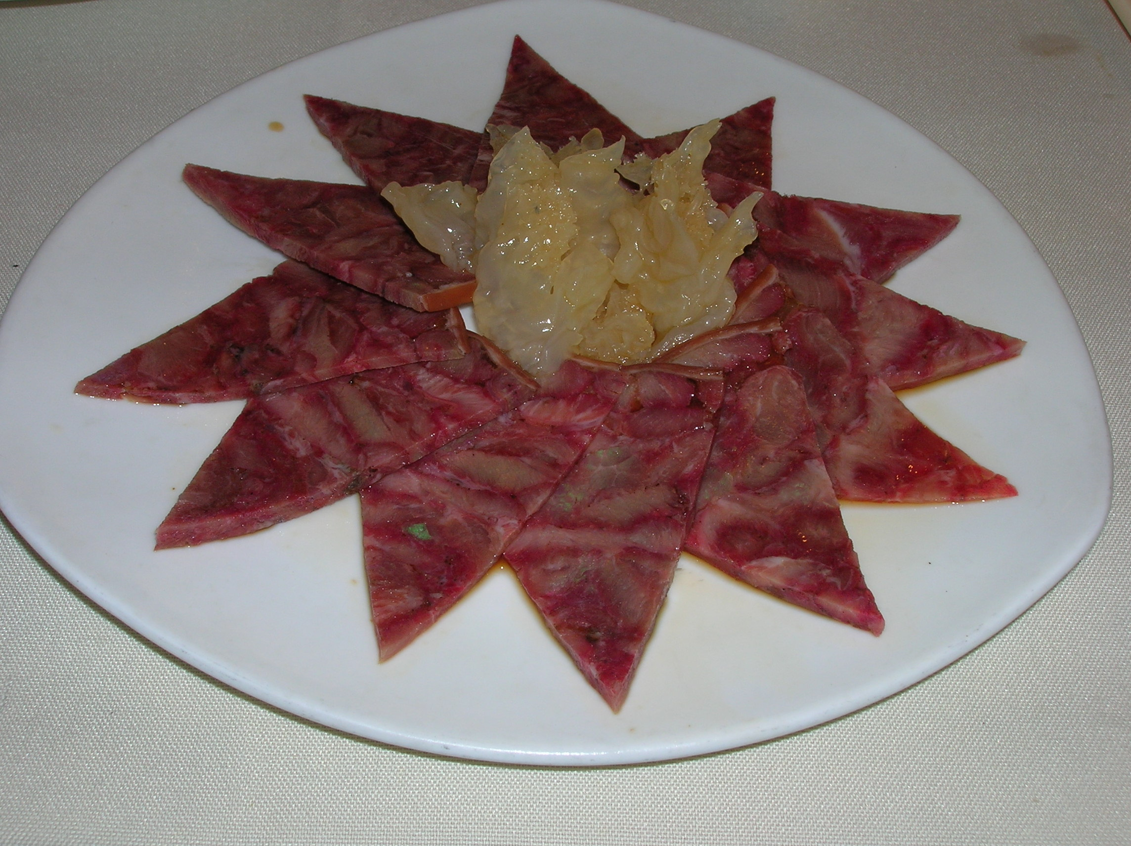 רגלי חזיר במסעדת יונג קי